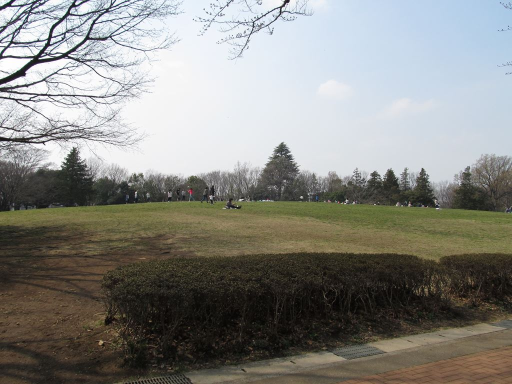 府中の森公園